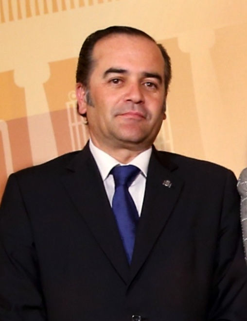 Cospedal: “El delegado del Gobierno es trascendental para conjugar los intereses de todas las administraciones, que deben ser los intereses de los ciudadanos” · Reivindica esta labor en un momento como el actual en el que “algunos tratan de cambiar nuestro Estado de las Autonomías descentralizado con una única nación, que es la nación española” · Afirma que “no estamos en unos tiempos en los que se pueda venir a ejercer la política con frivolidad sino con sentido del deber y de servicio a la patria” · Destaca “la responsabilidad y la lealtad a su país” de José Julián Gregorio, así como su “cercanía, trabajo y perseverancia” · Gregorio muestra su agradecimiento a Cospedal por sus “valores, por ser un modelo del buen político y servirme de guía en esta nueva andadura” · Antonio Beteta elogia el trabajo de la presidenta en Castilla-La Mancha porque “era una comunidad que estaba quebrada y que ha sabido sacar adelante”